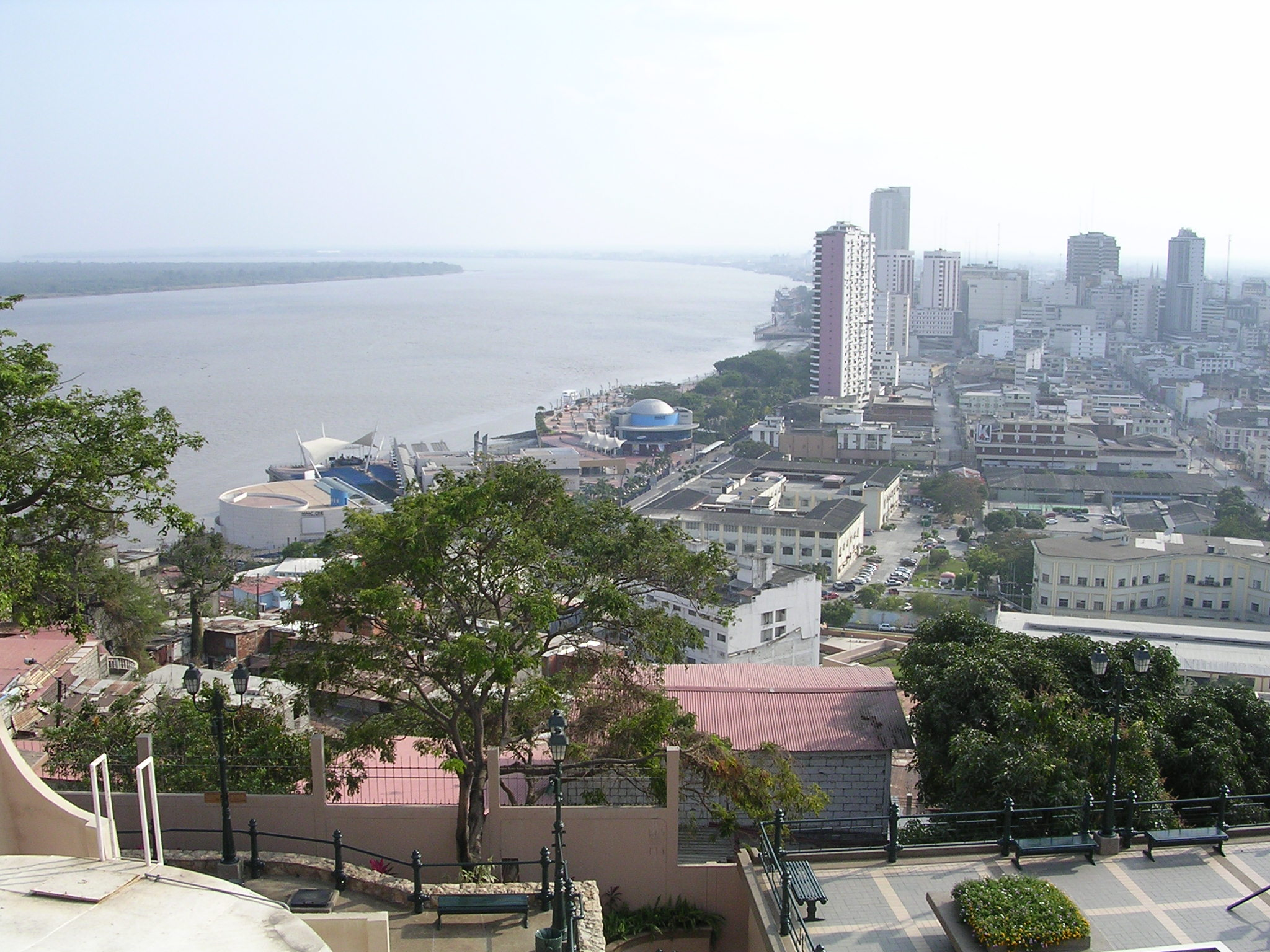 River Guayas along Guayaquil from Cerro de Santa Ana.